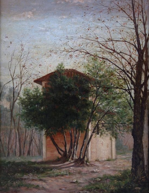 Peisaj cunoscut și ca Turn în pădure, Nr. inventar 1158, ulei pe pânză, 0,460 x 0,320 m, semnat jos dreapta cu brun: M. Ştefănescu - fost la Muzeul Kalinderu, Muzeul Naţional de Artă al României, Bucureşti